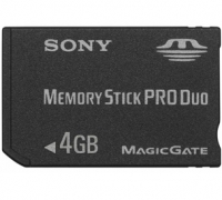 Tarjeta de memoria Memory Stick Pro Duo de Sony